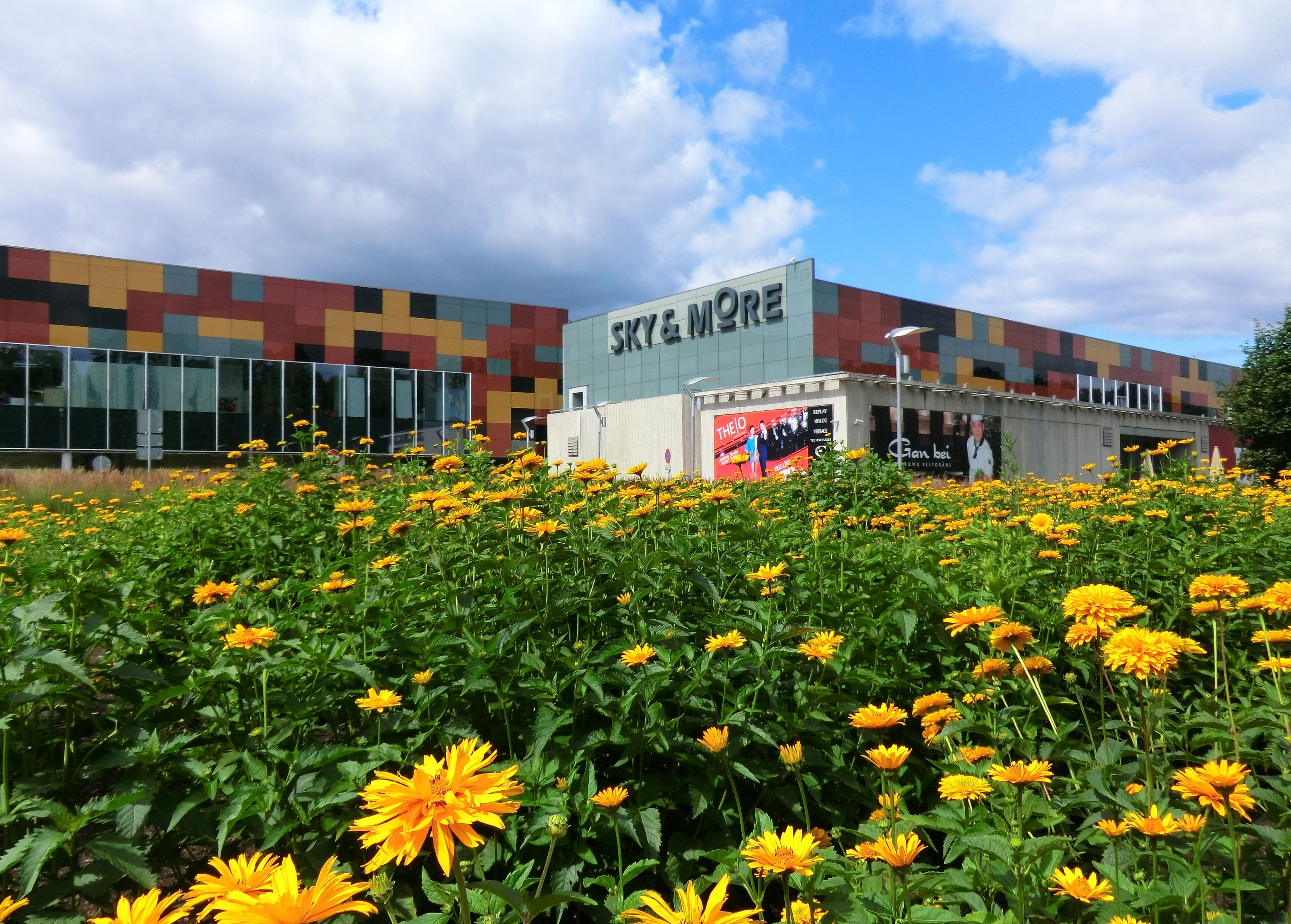 Sky & More (3)